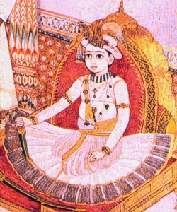 H.H. Kshatriya Kulawatasana, Sinhasanadhishwar, Shrimant Rajashri Shahaji Chhatrapati Maharaj Bhonsle [Abba Sahib], Raja of Satara.